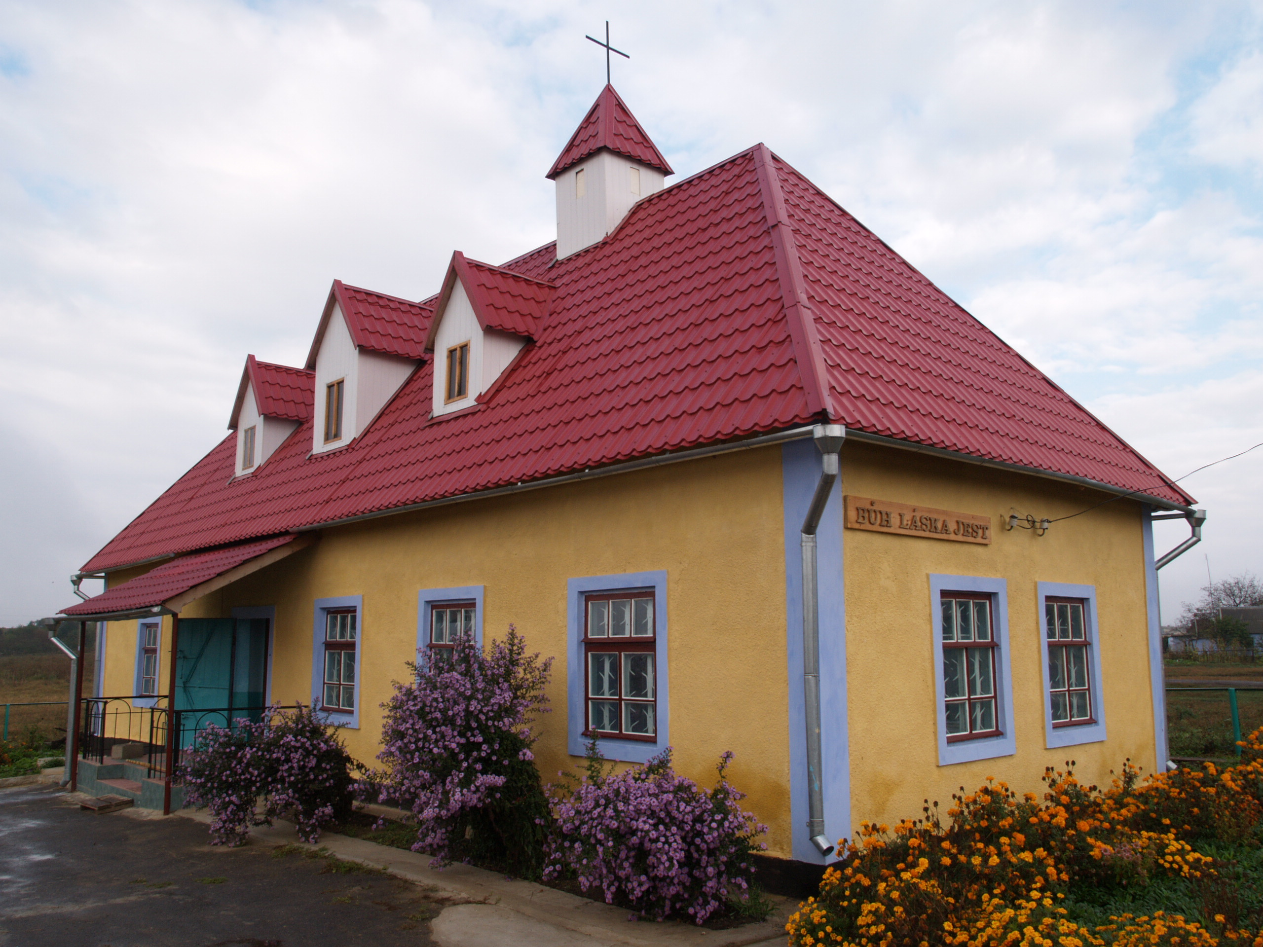 Modlitebna ve Veselynivce